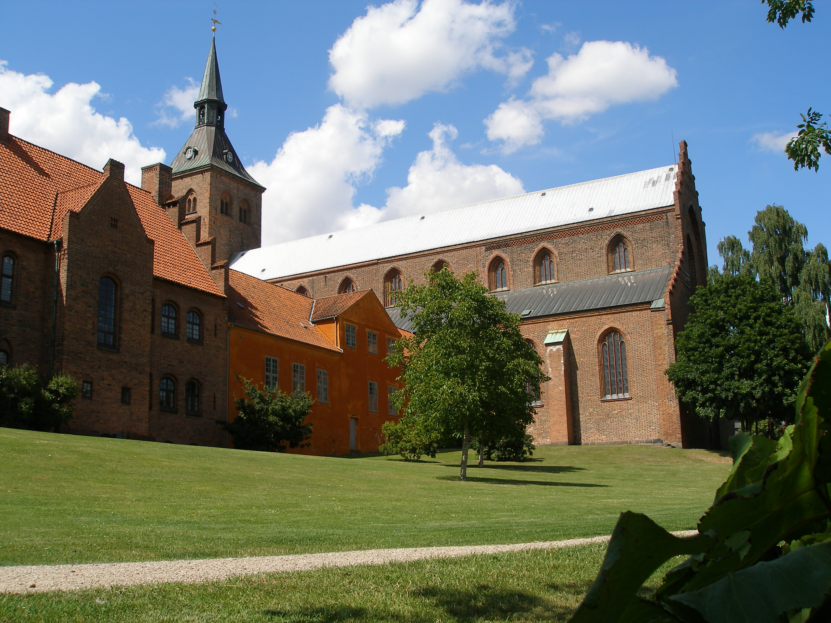 Til højre: Sankt Knuds Kirke (Odense). Til venstre: Sankt Knuds Kloster